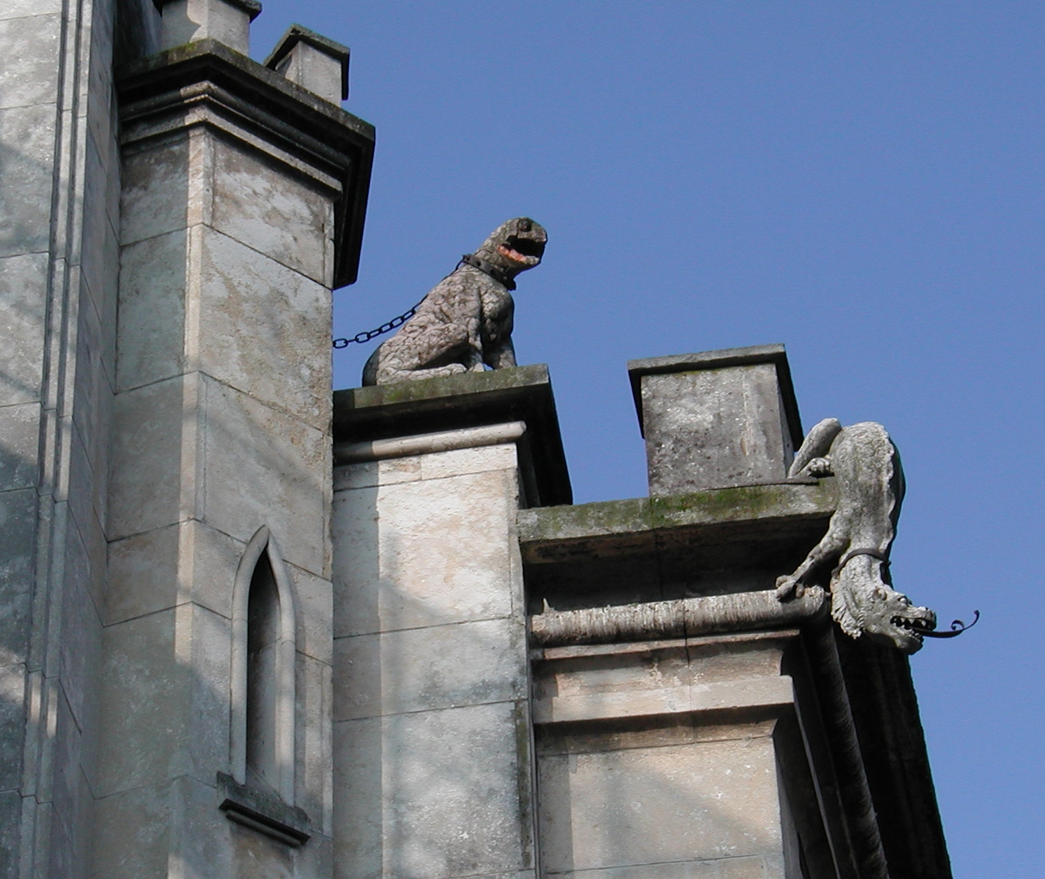 Reggio Emilia, italy Palaces of Reggio Emilia neogothic sculptures, Galleria parmeggiani author:Paolo da Reggio 2006